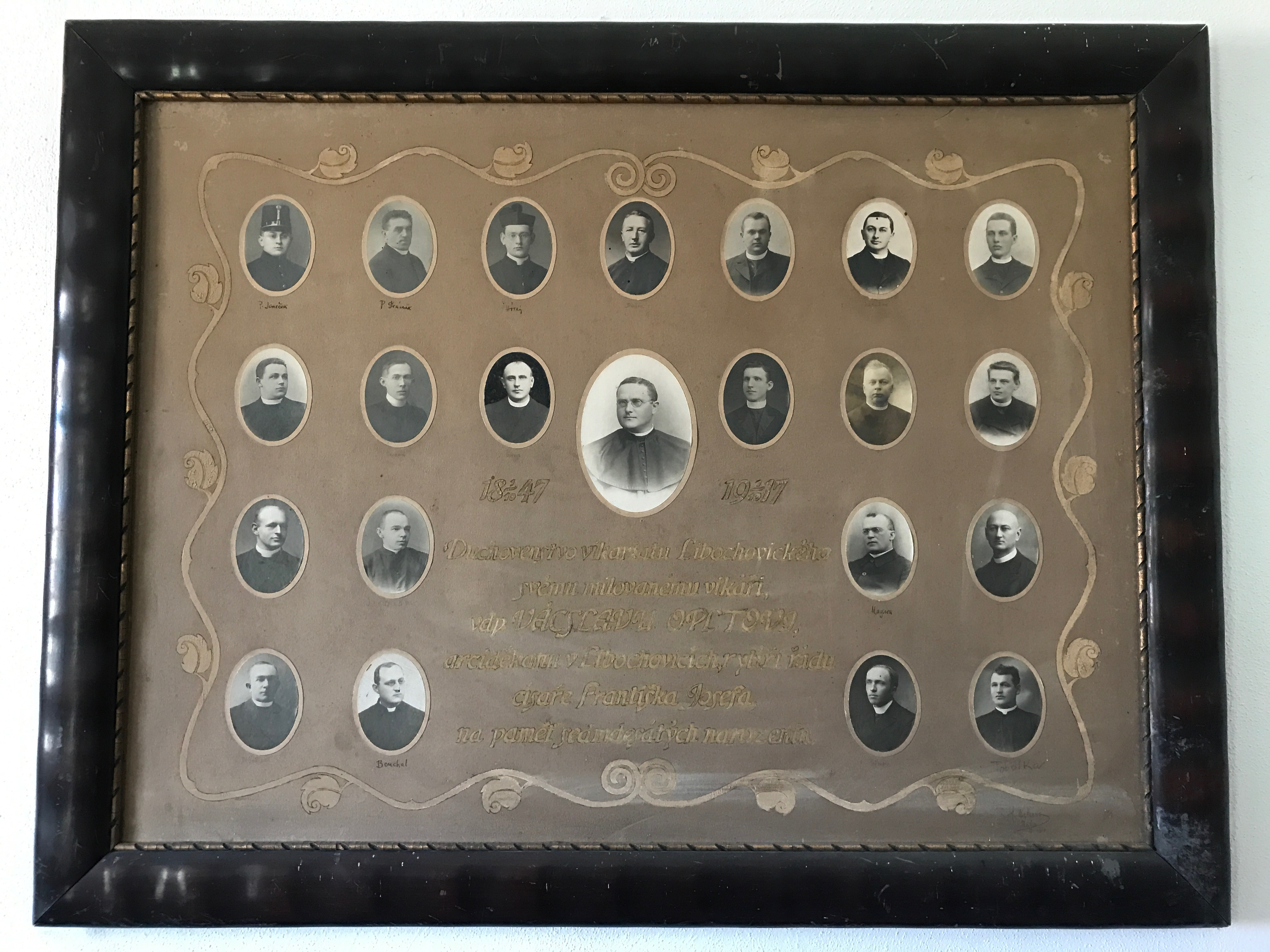 Tablo kněží libochovického vikariátu z roku 1917 jako poděkování Václavu Opltovi